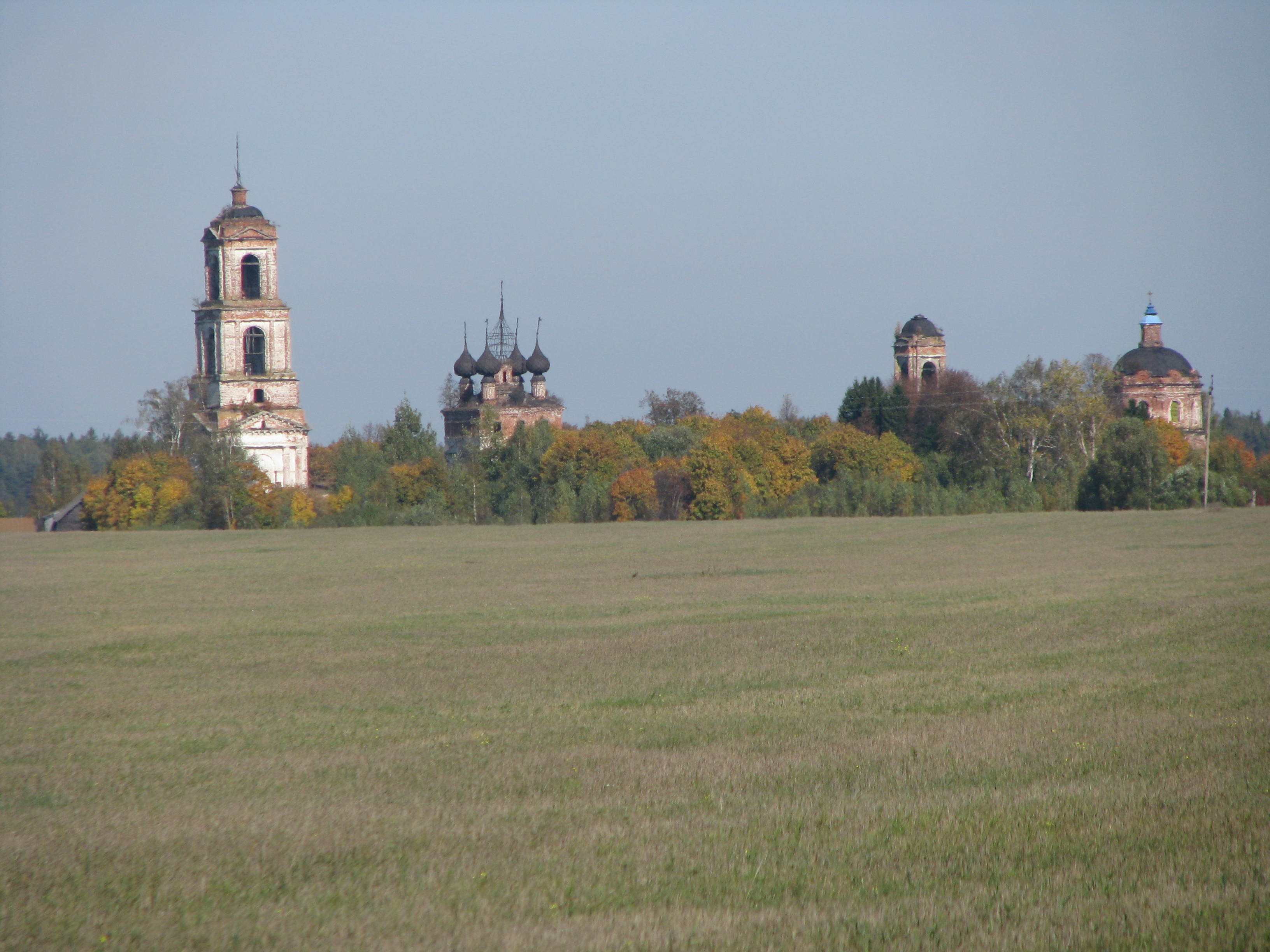 Храмовый комплекс (Ивановская область, Савинский район, село Алексино)